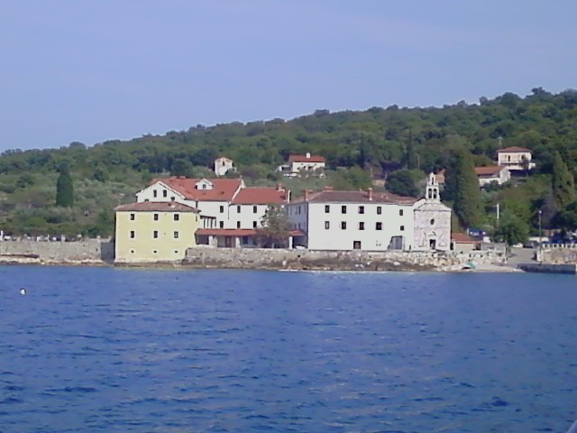 Otok Krk. Franjevački samostan na Glavotoku.